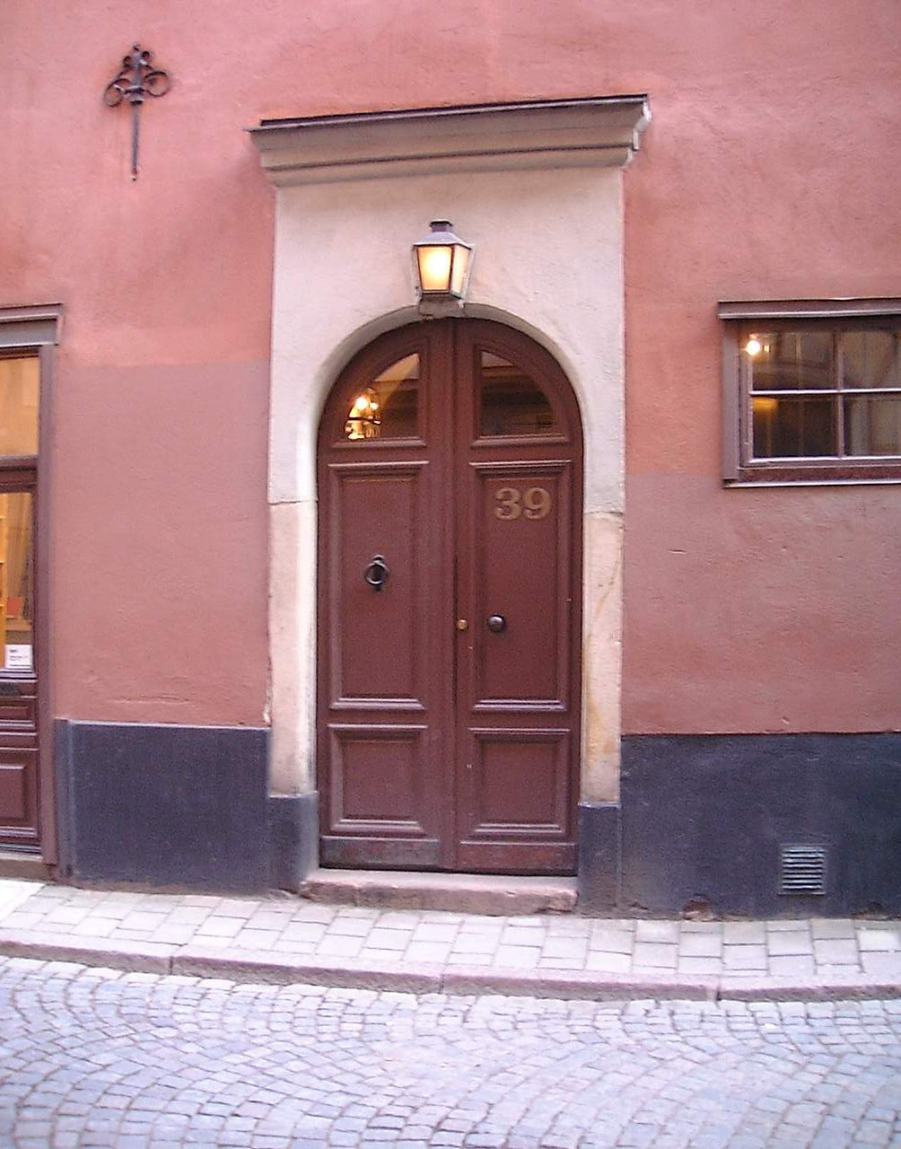 39, Österlånggatan, Gamla stan, Stockholm.